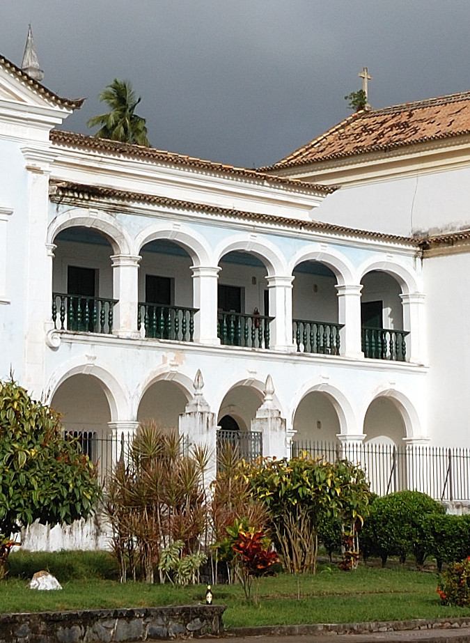 Cachoeira, Brazil [2011]